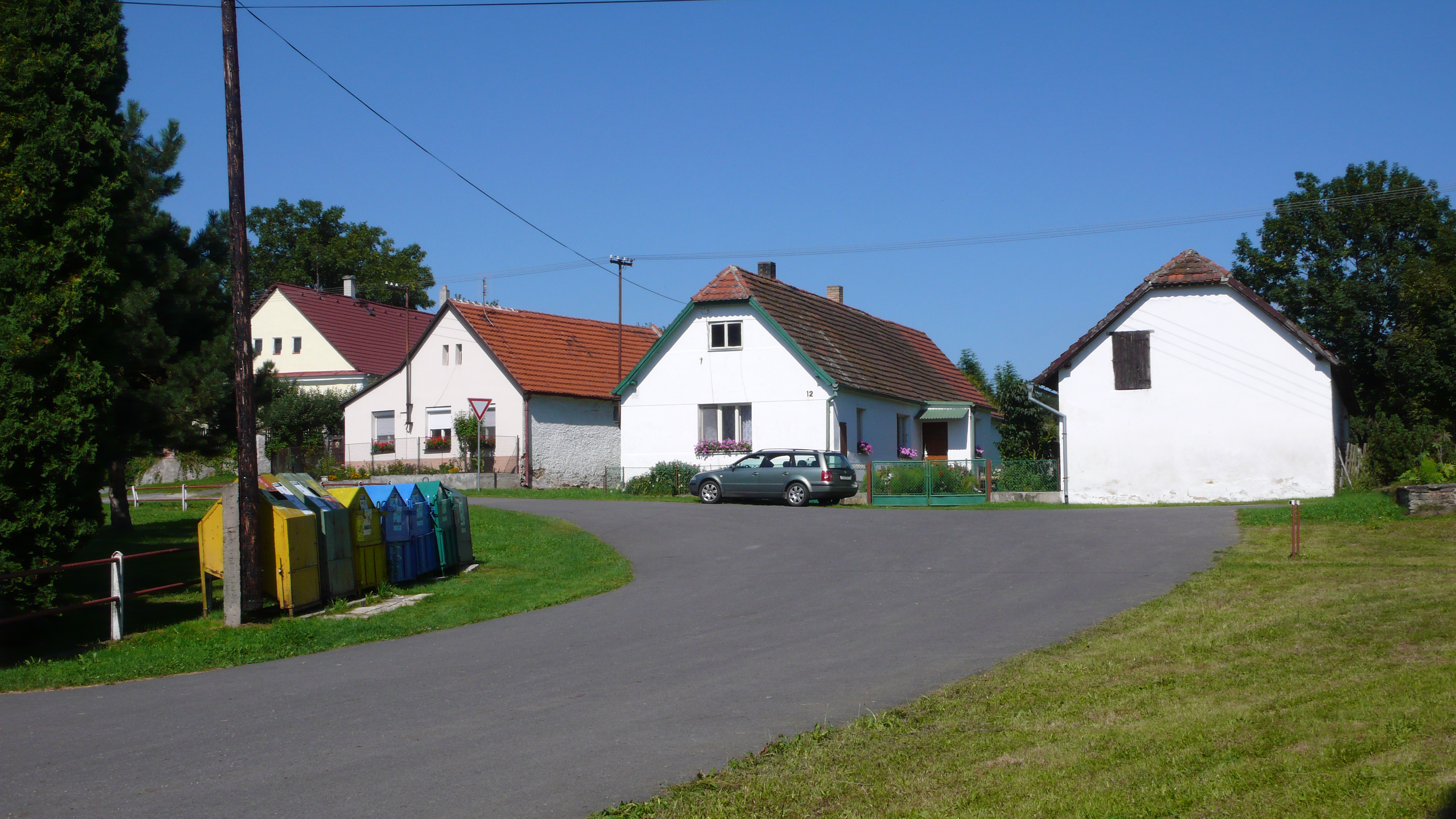 Náves v Jetěticích (2010)